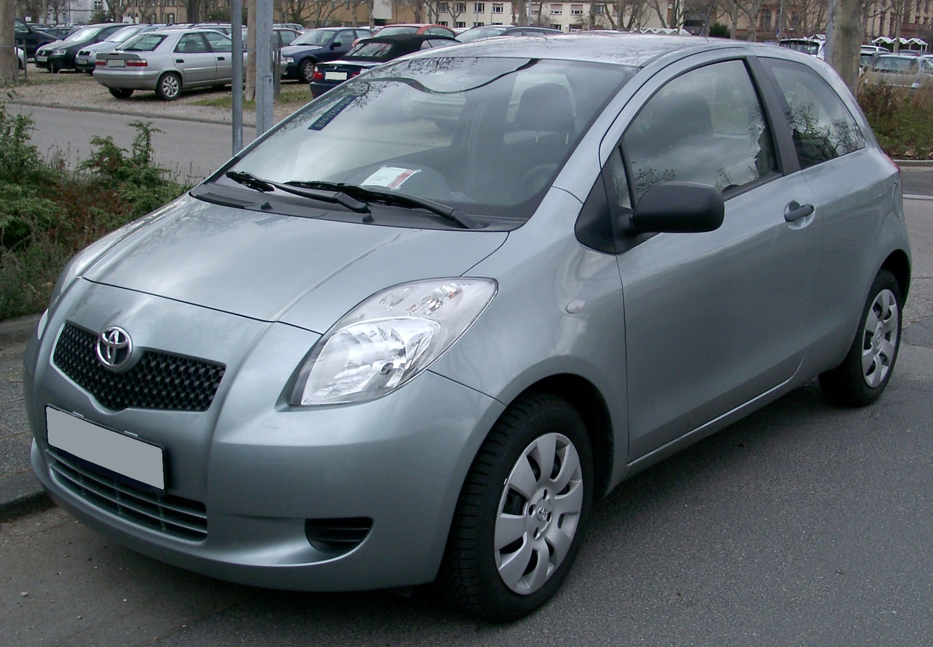 Toyota Yaris, 2. Generation